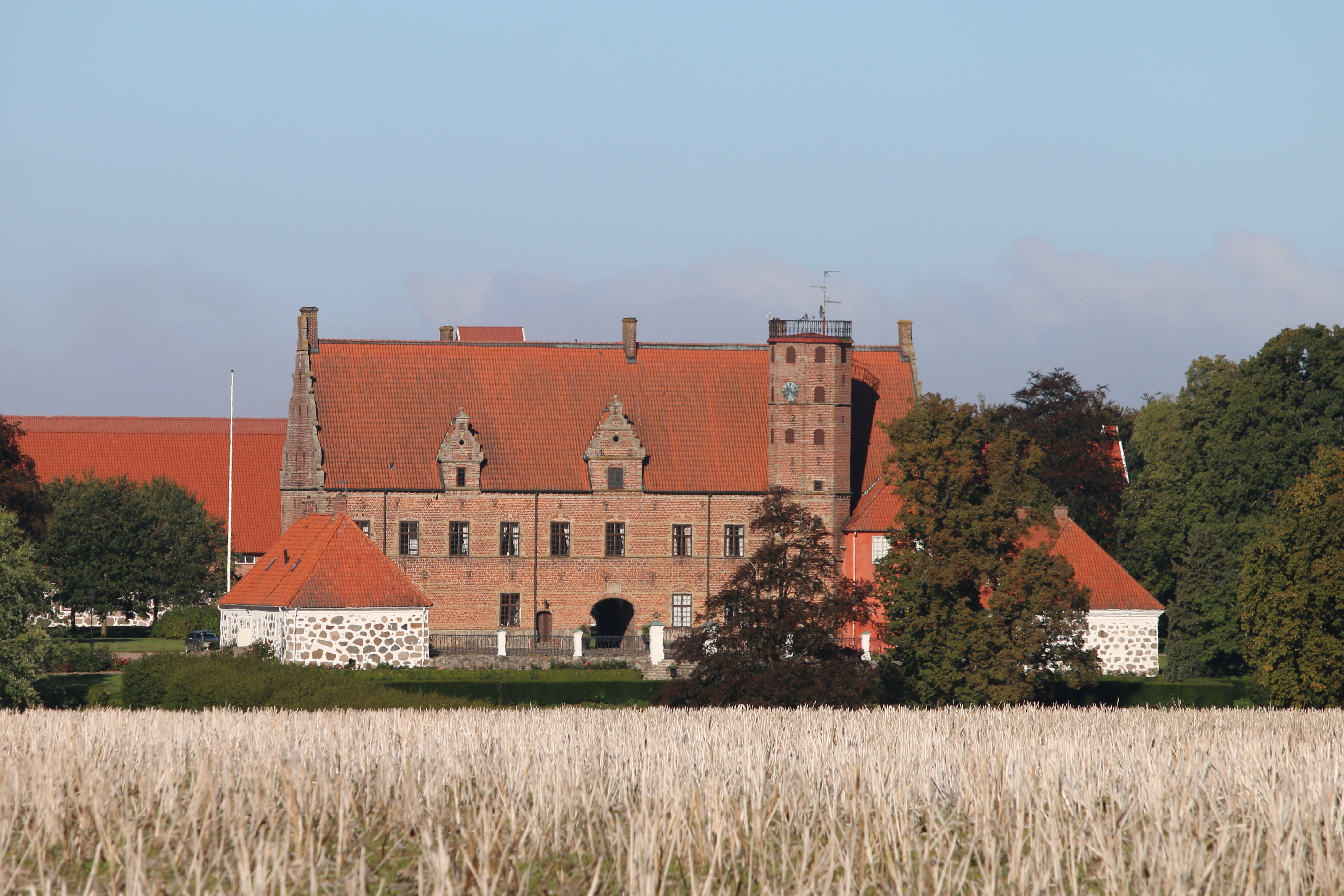 Svenstorps slott i september 2015